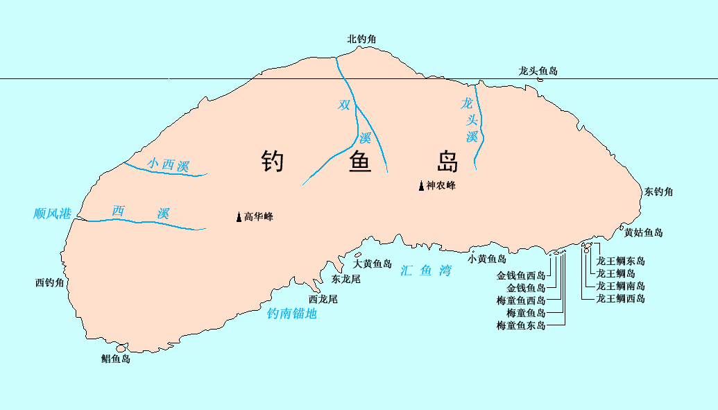 钓鱼岛各地理标准名称